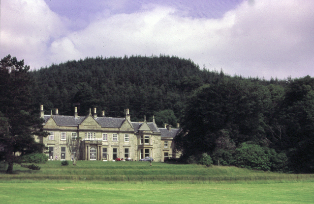 Raasay House, Raasay, Scotland